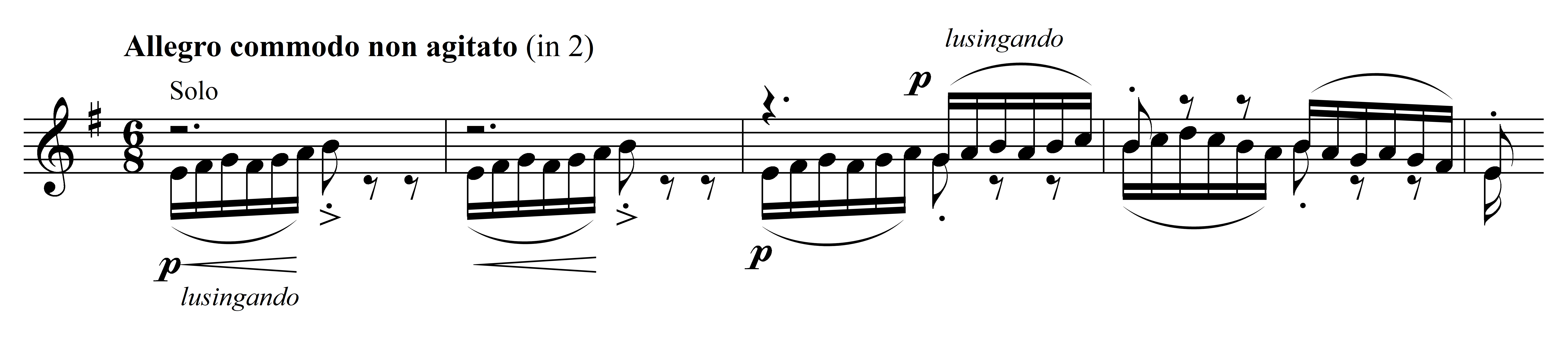 Notenbeispiel Smetana Die Moldau Die Quellen T. 1-4